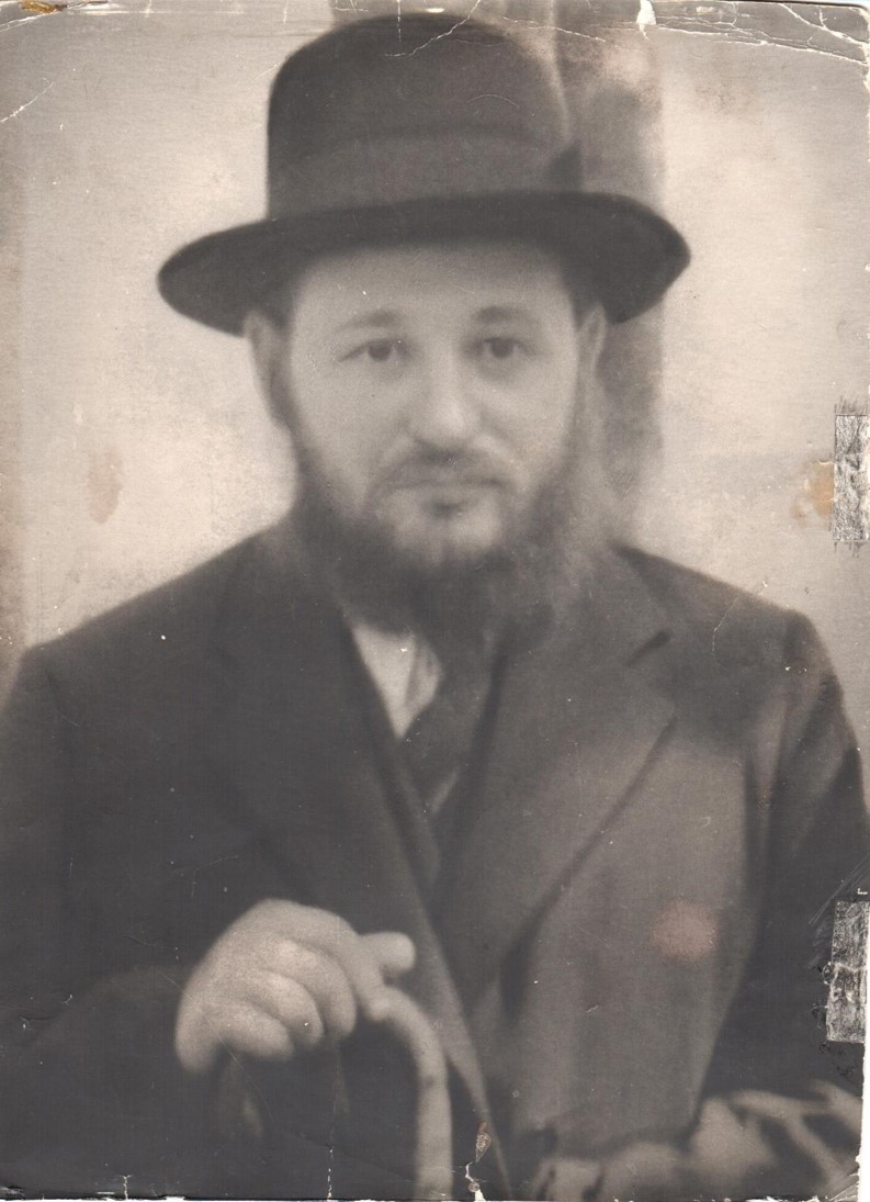 נהרג על קידוש ה'